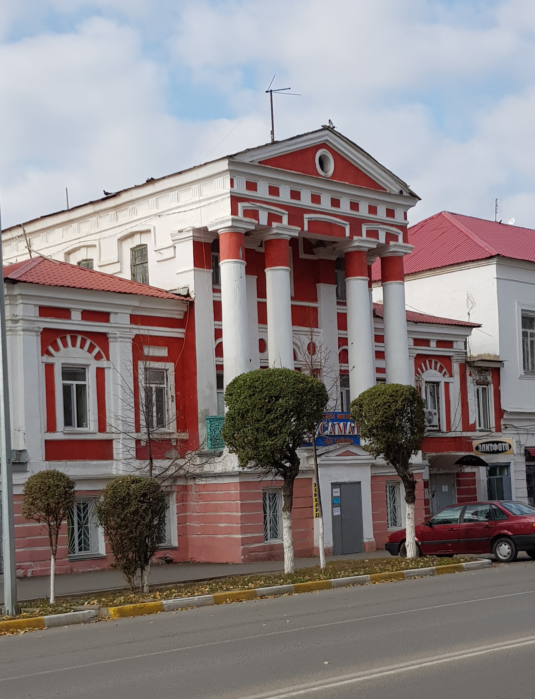 Дом Мизиновых в Уральске. Автор проекта - Микеле Дельмедино. 1825 год